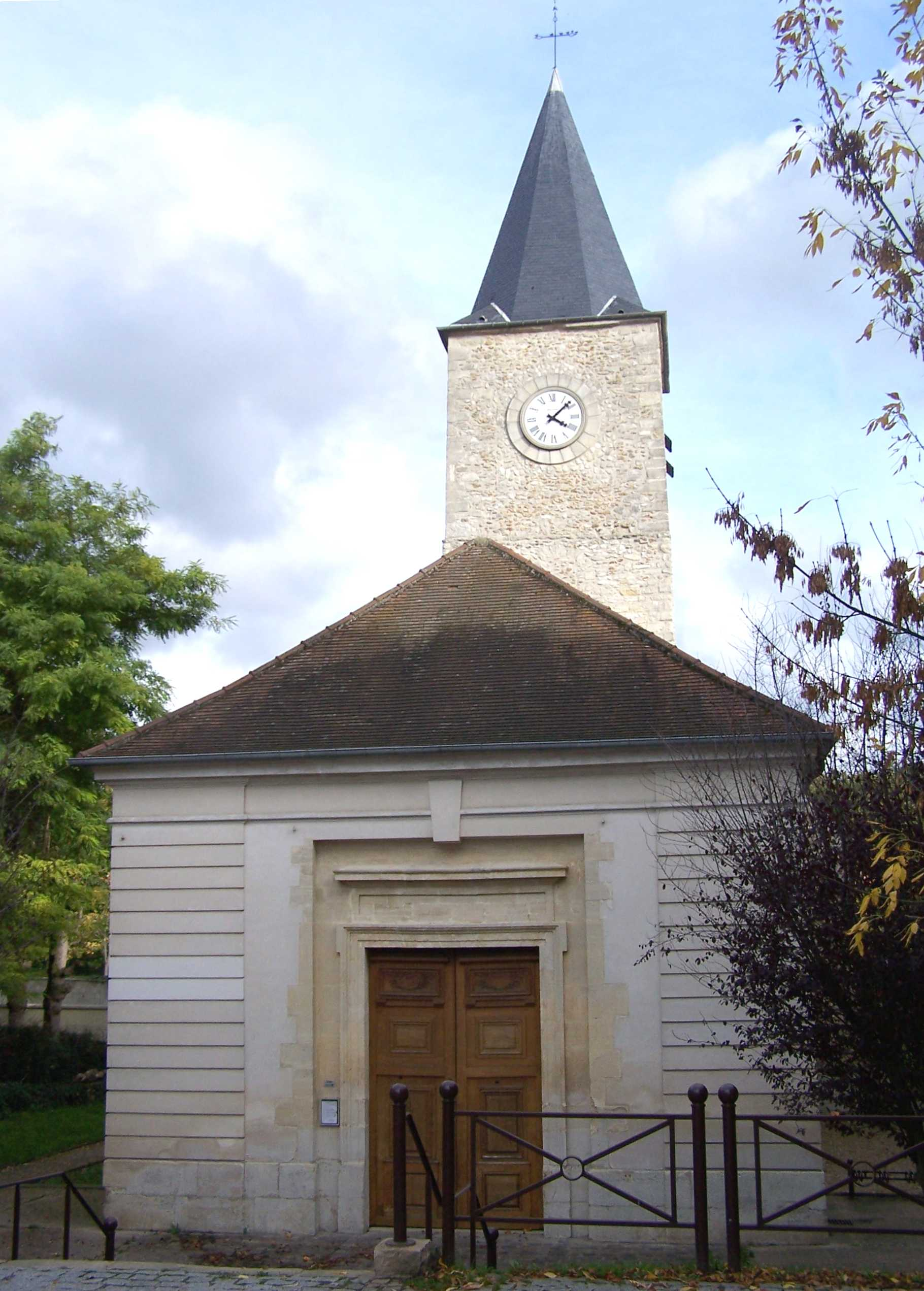 Église de Bailly (Yvelines, France)